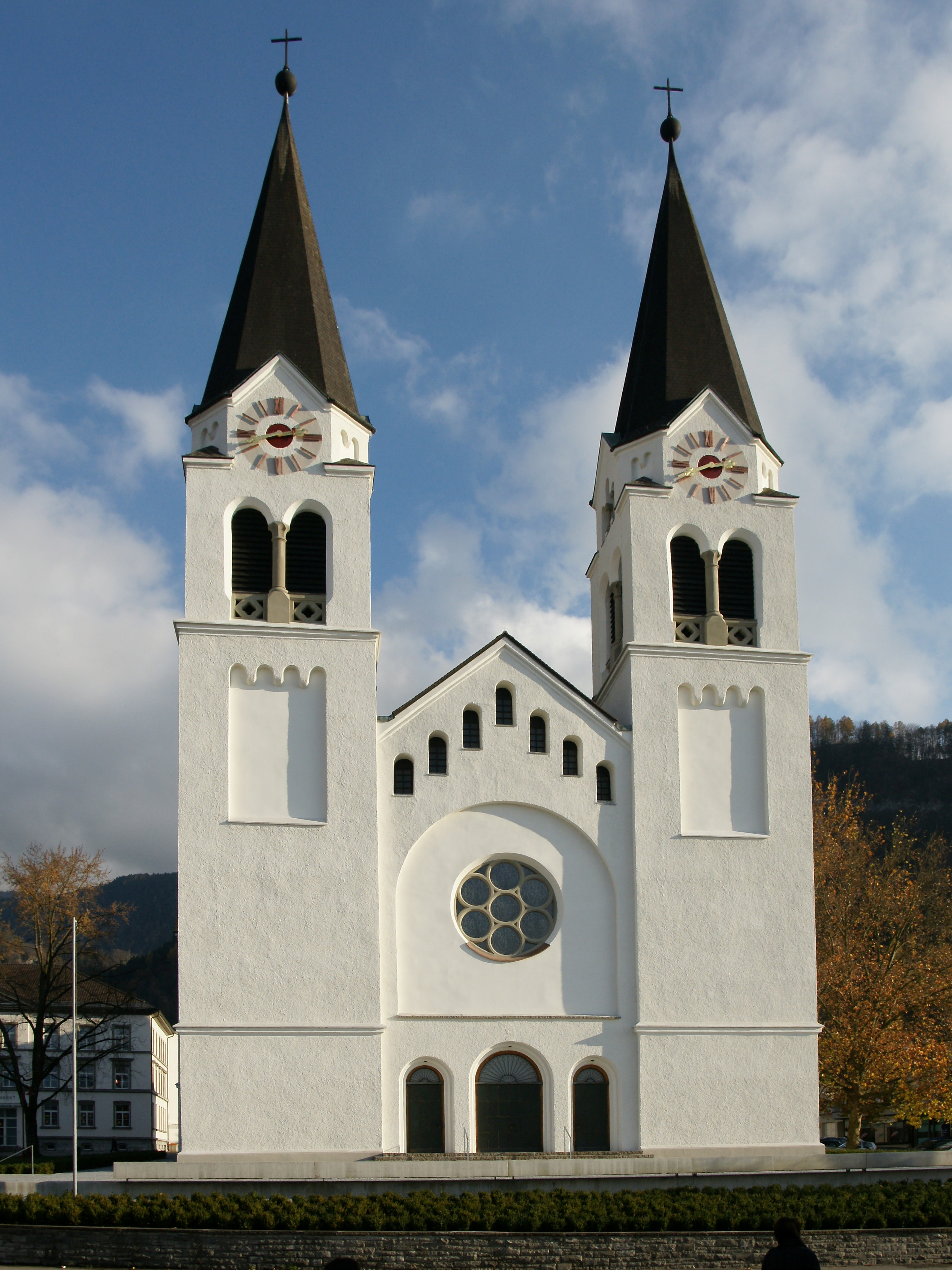 neue Pfarrkirche hl. Ulrich im heutigen Ortszentrum von Götzis. 1862-1865 nach Plan von "Anton Geppert" durch Baumeister J.Wilhelm erbaut. Glasmalereien ausgeführt von der Tiroler Glasmalereianstalt. 2008 generalsaniert.